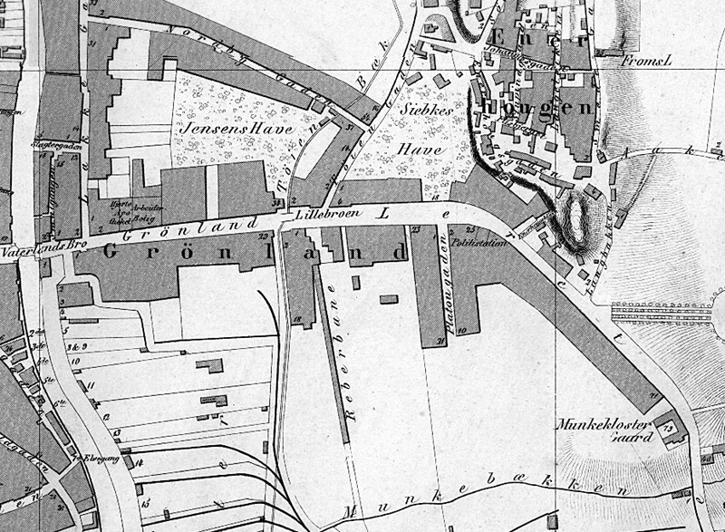 Kart over Grønland, Oslo, 1861.